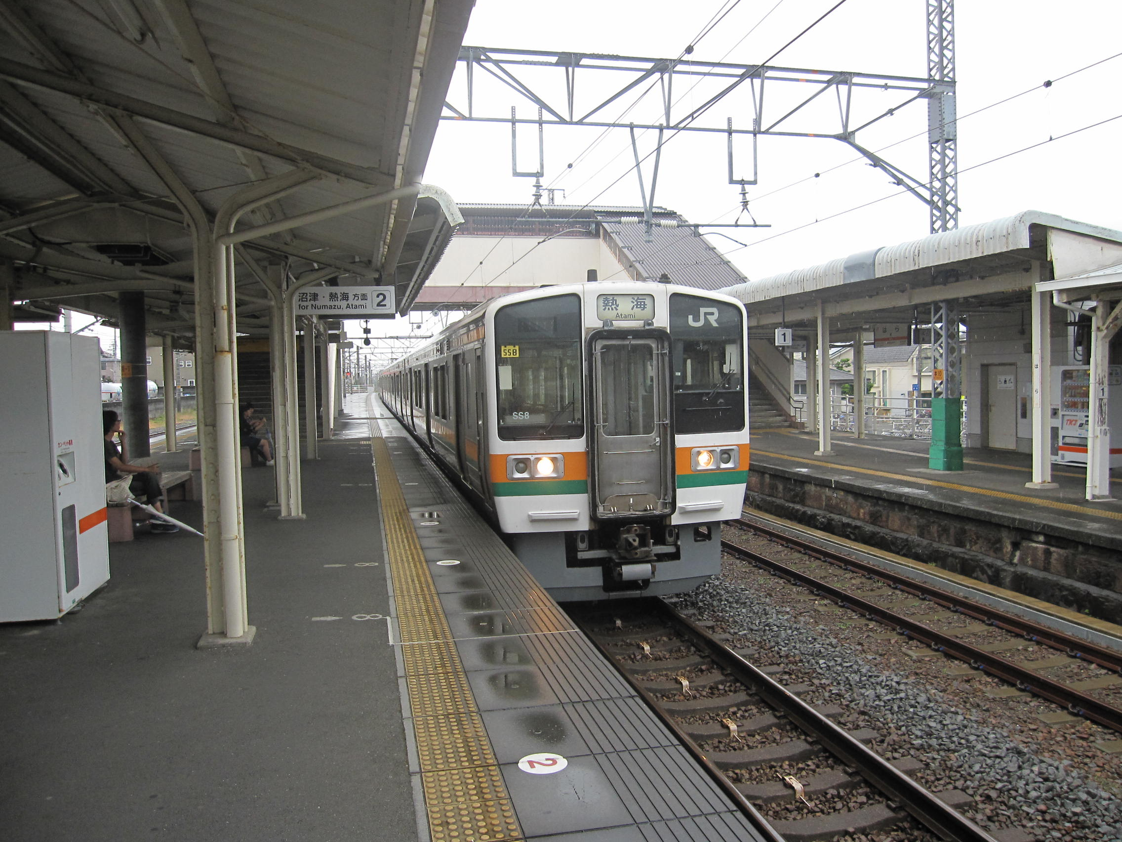 静岡県沼津市原駅。